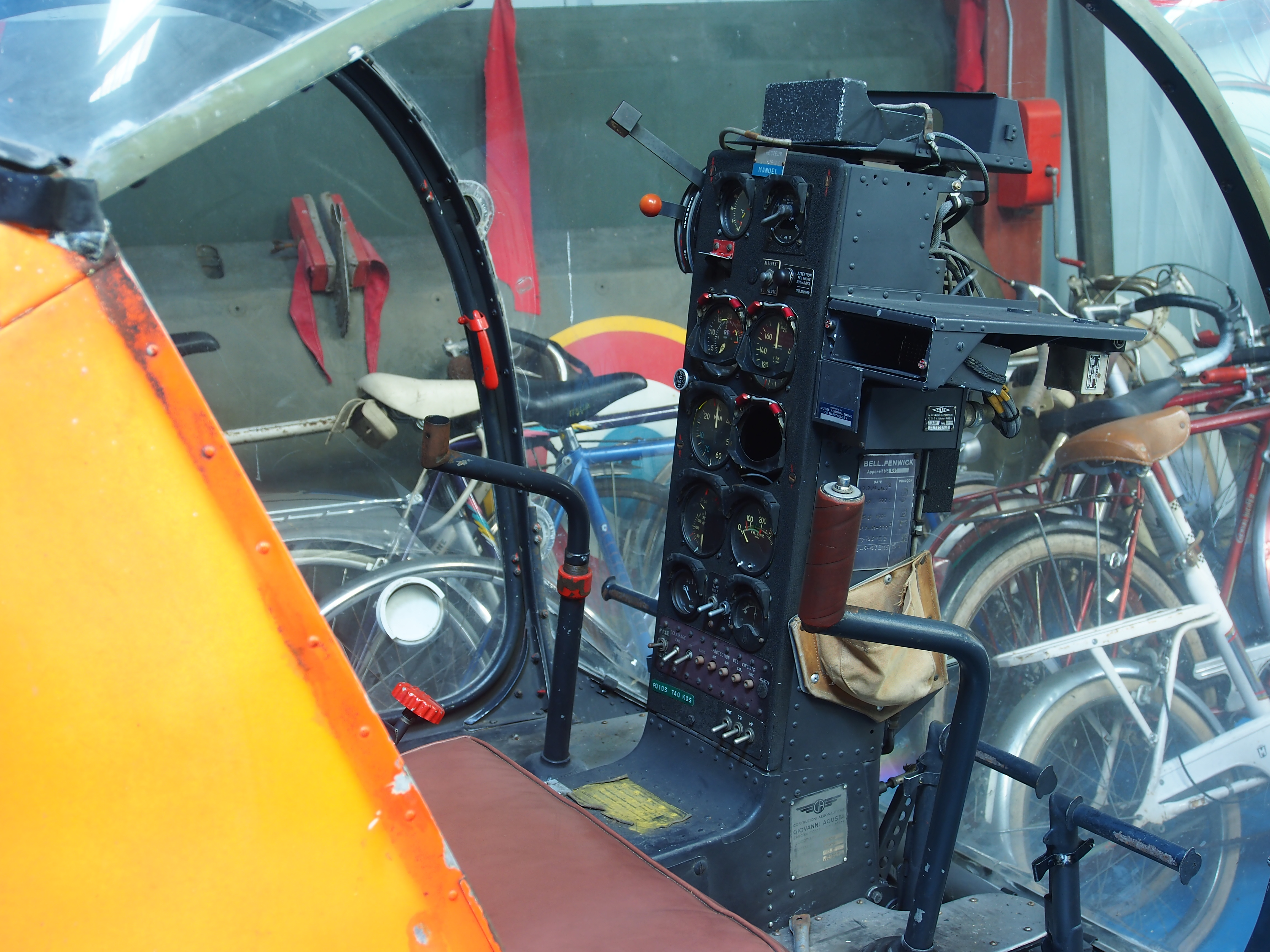 Photographed at the Musée de l'Epopée de l'Industrie et de l'Aéronautique, Albert, France.